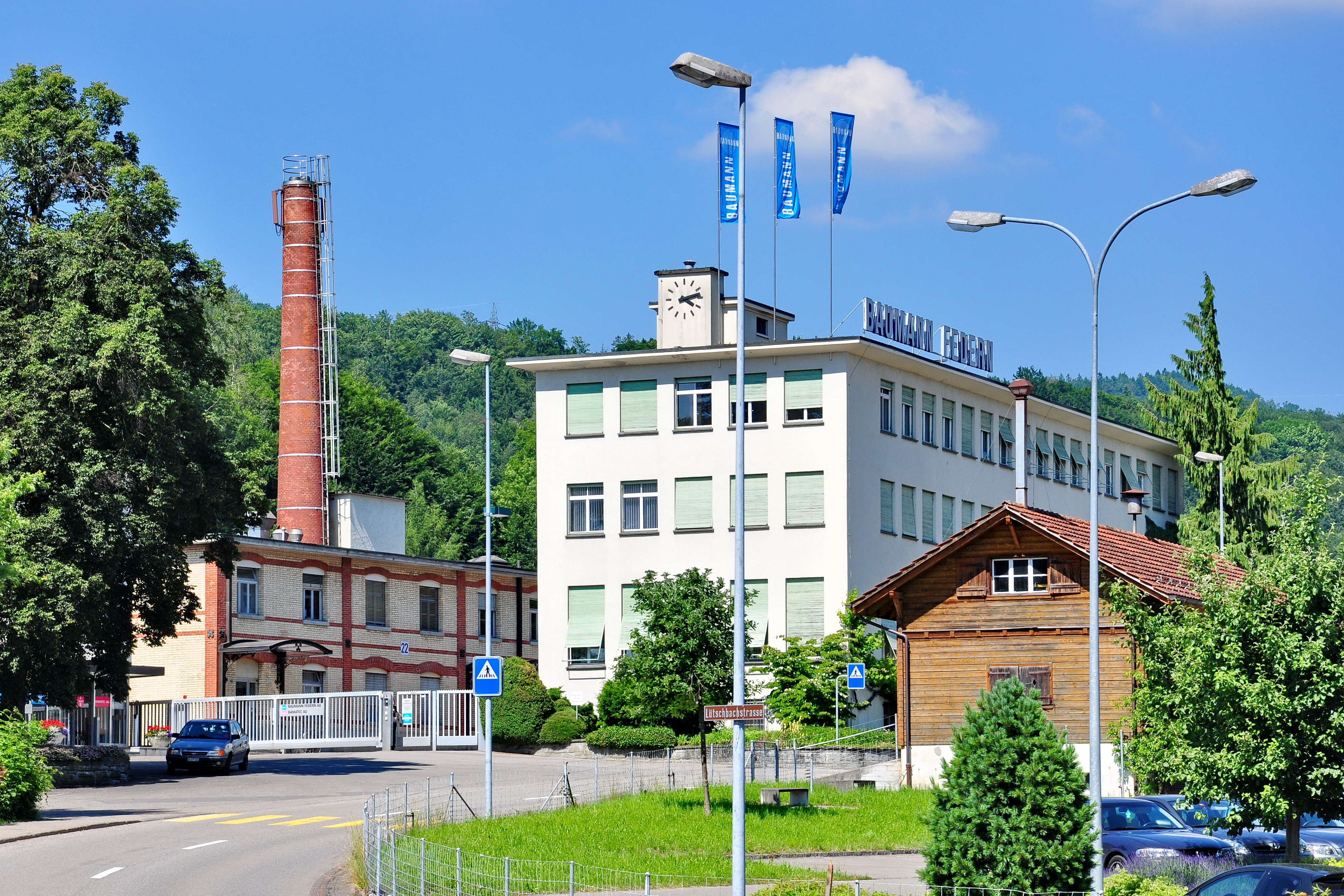 Baumann Federn in Ermenswil (Switzerland)